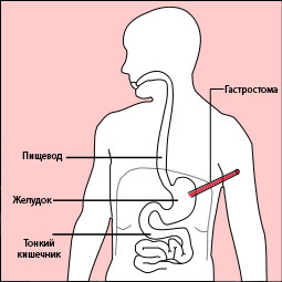 Схематическое изображение результата гастростомии